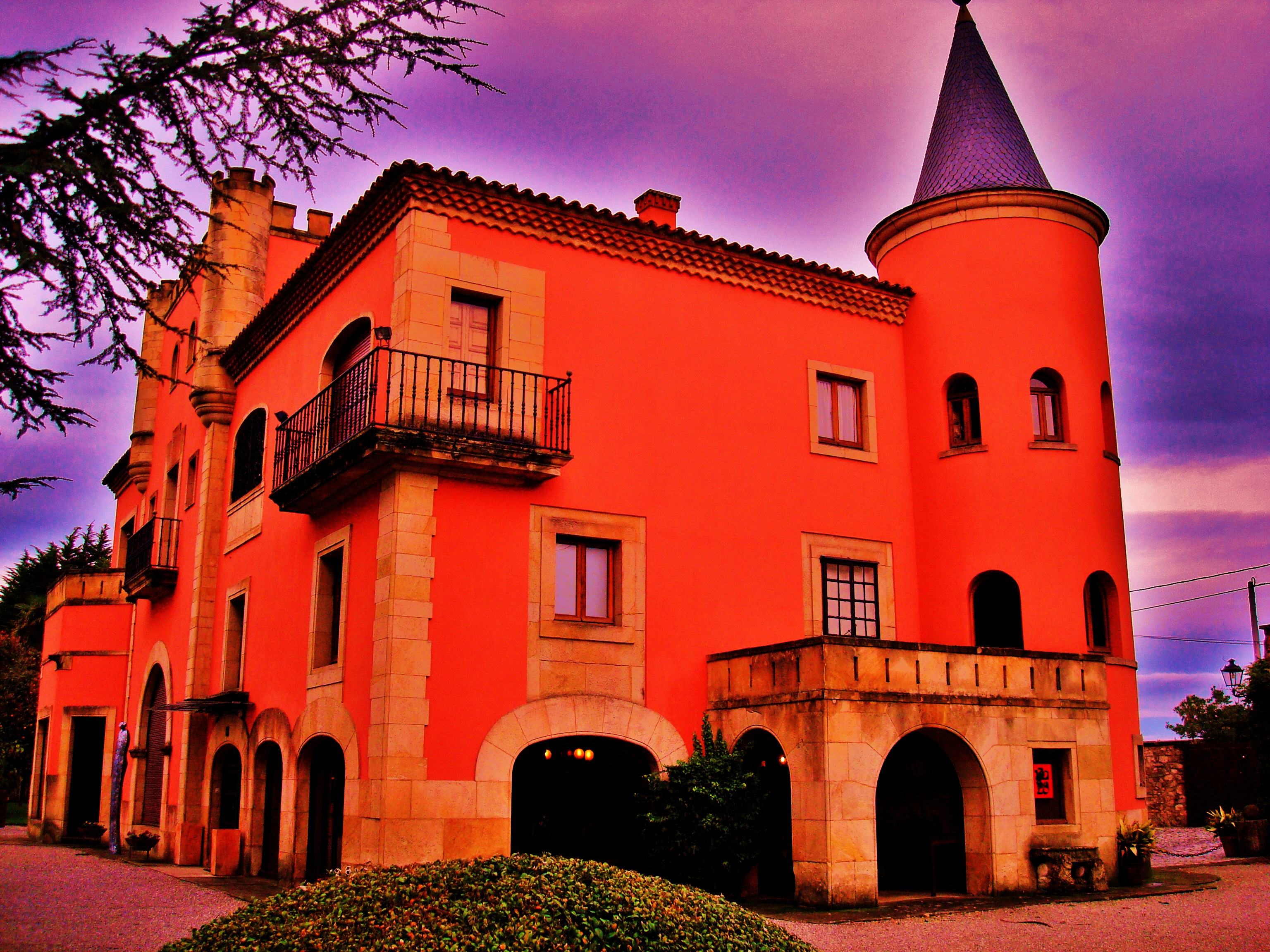 Muséu Evaristo Valle (Xixón)